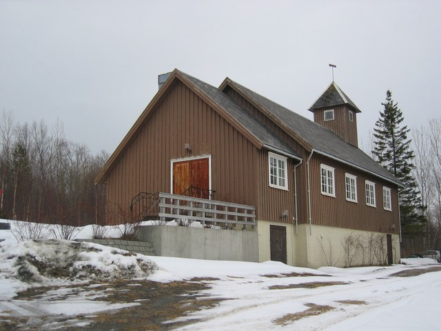 Helland kapell i Tysfjord